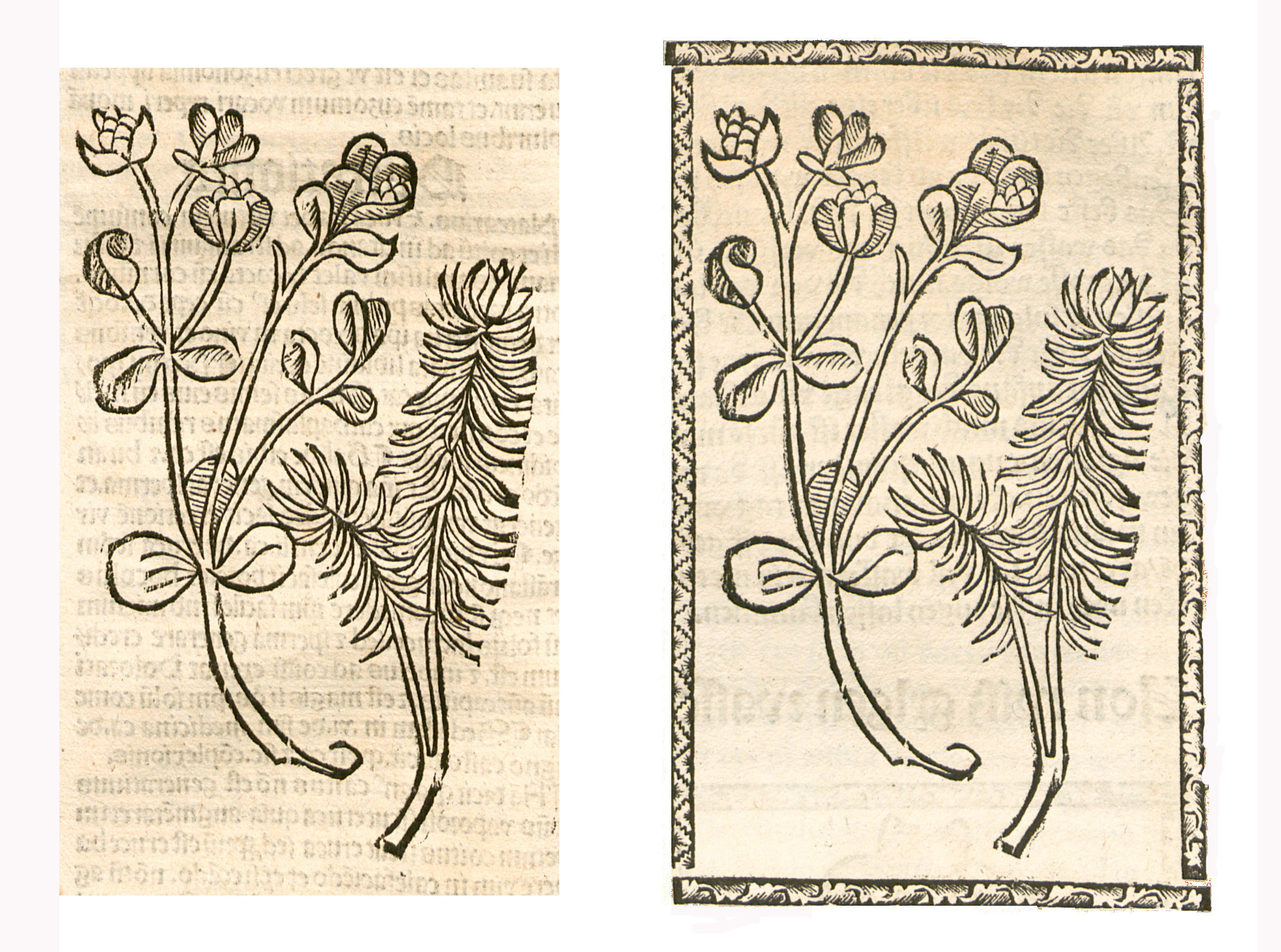 Abbildung von: Wolfs Milch (Euphorbia)